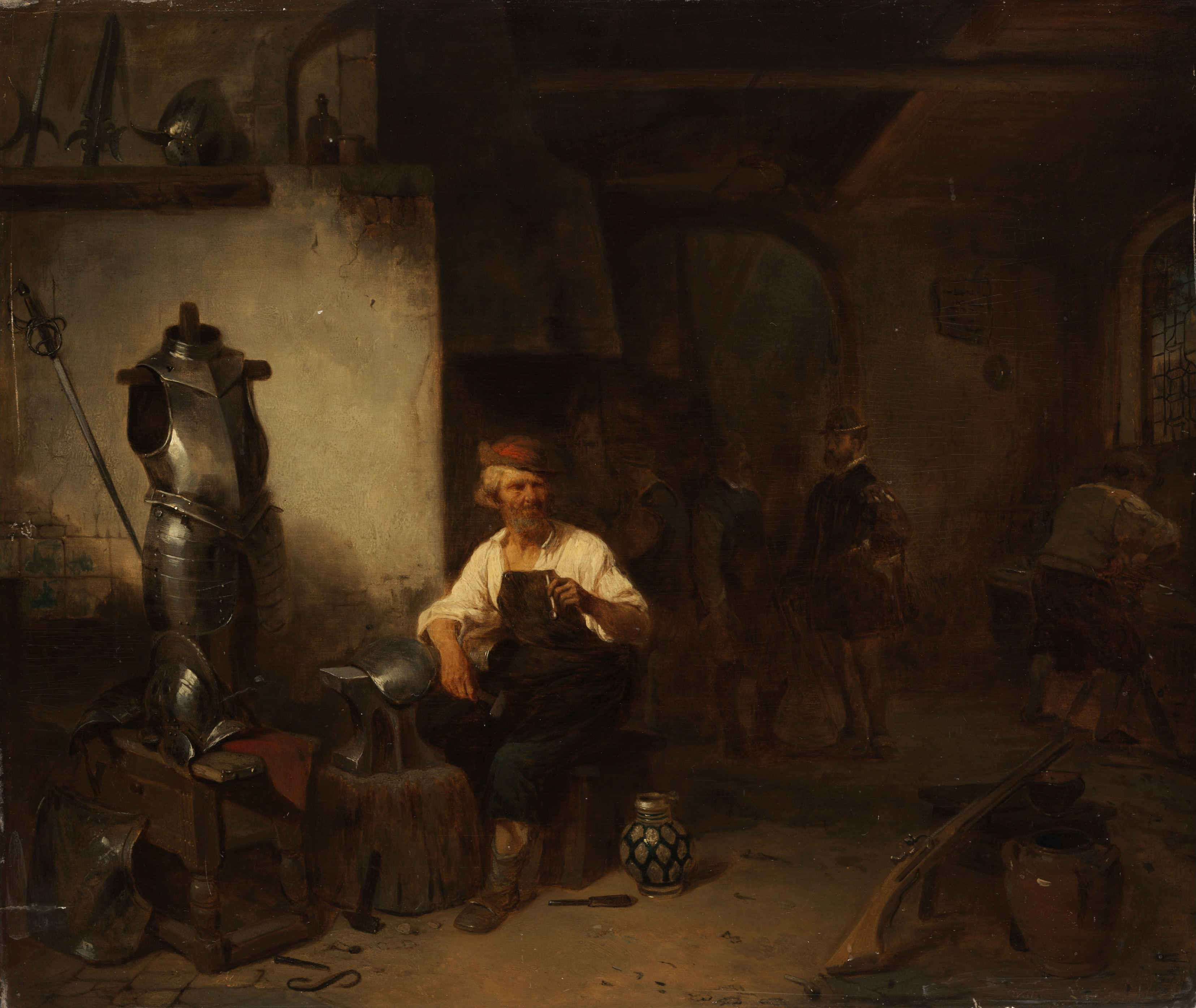 In der Waffenschmiede. Öl auf Holz. 50,5 x 61 cm. Rechts unten signiert.